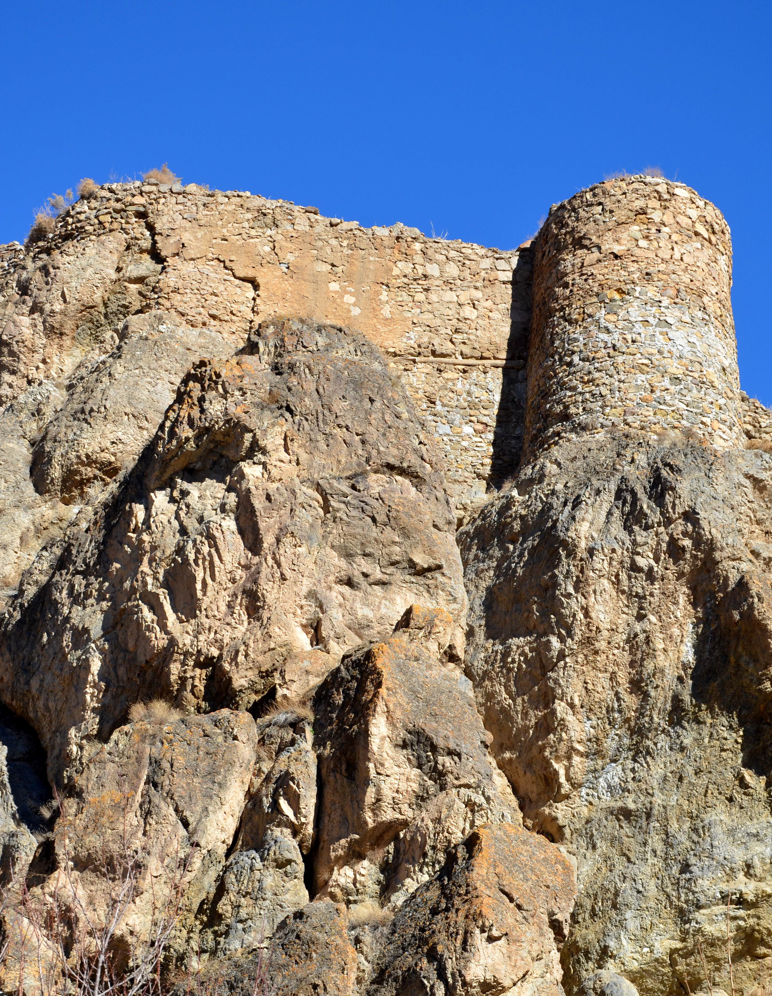 قلعه پولاد